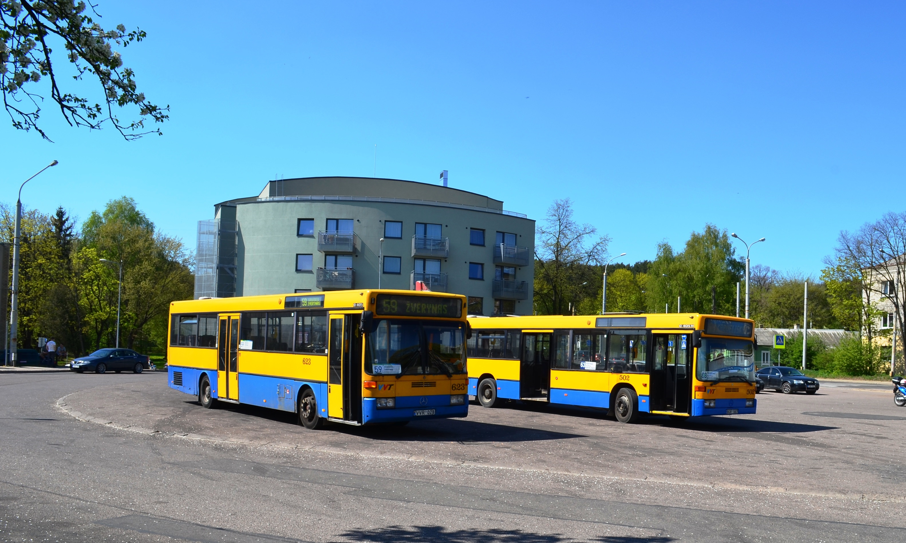 59 ir 63 maršrutų autobusai Vilniuje, Žvėryno žiede